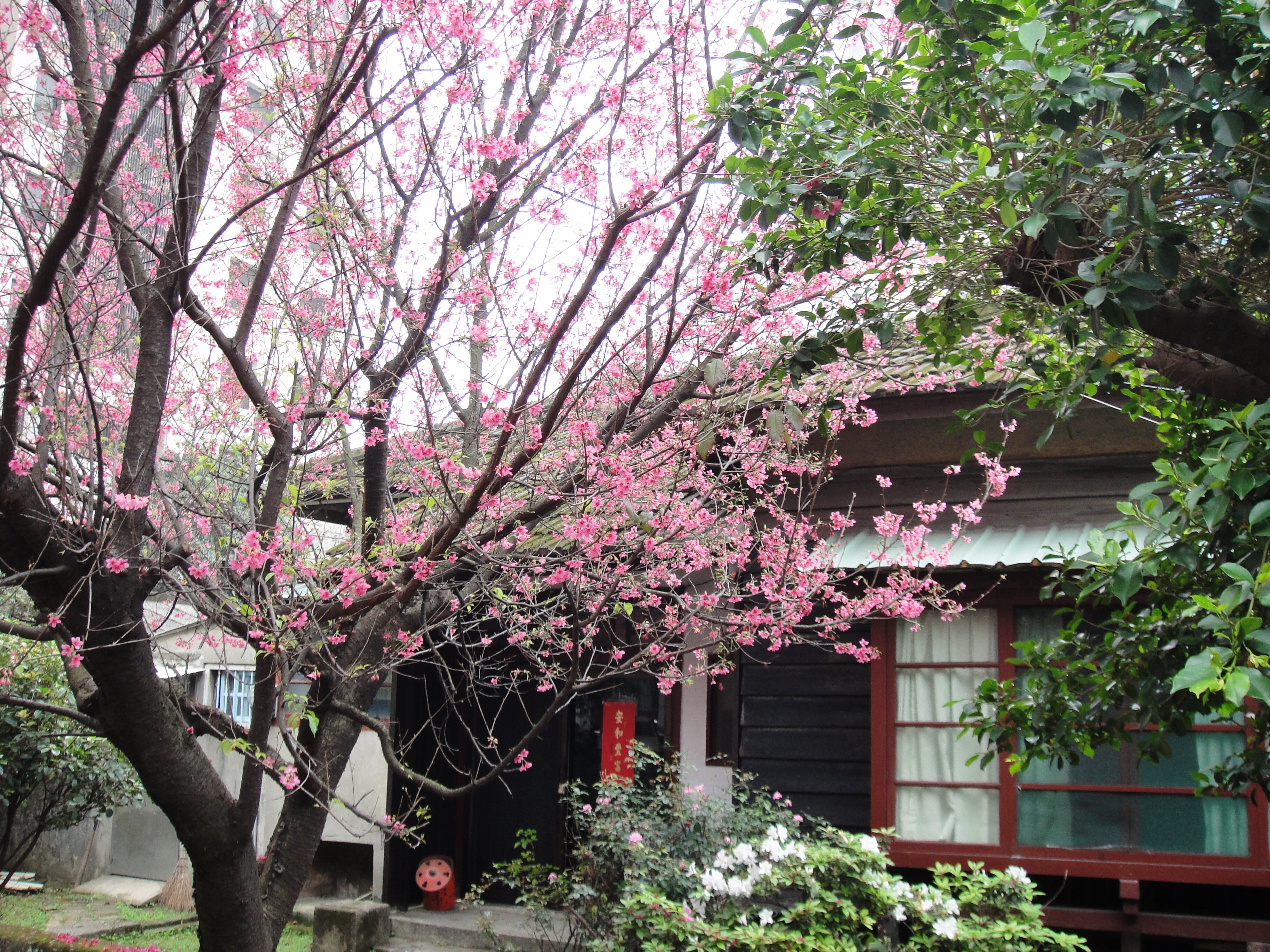 中文（台灣）: 中壢分局旁